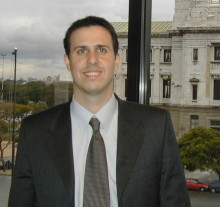 Diputado Diego Cánepa en su despacho del Palacio Legislativo en Montevideo